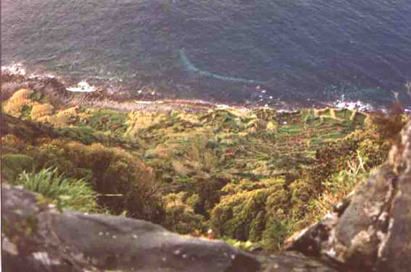 Fajã de Vasco Martins, ilha de são Jorge, Açores, Portugal.